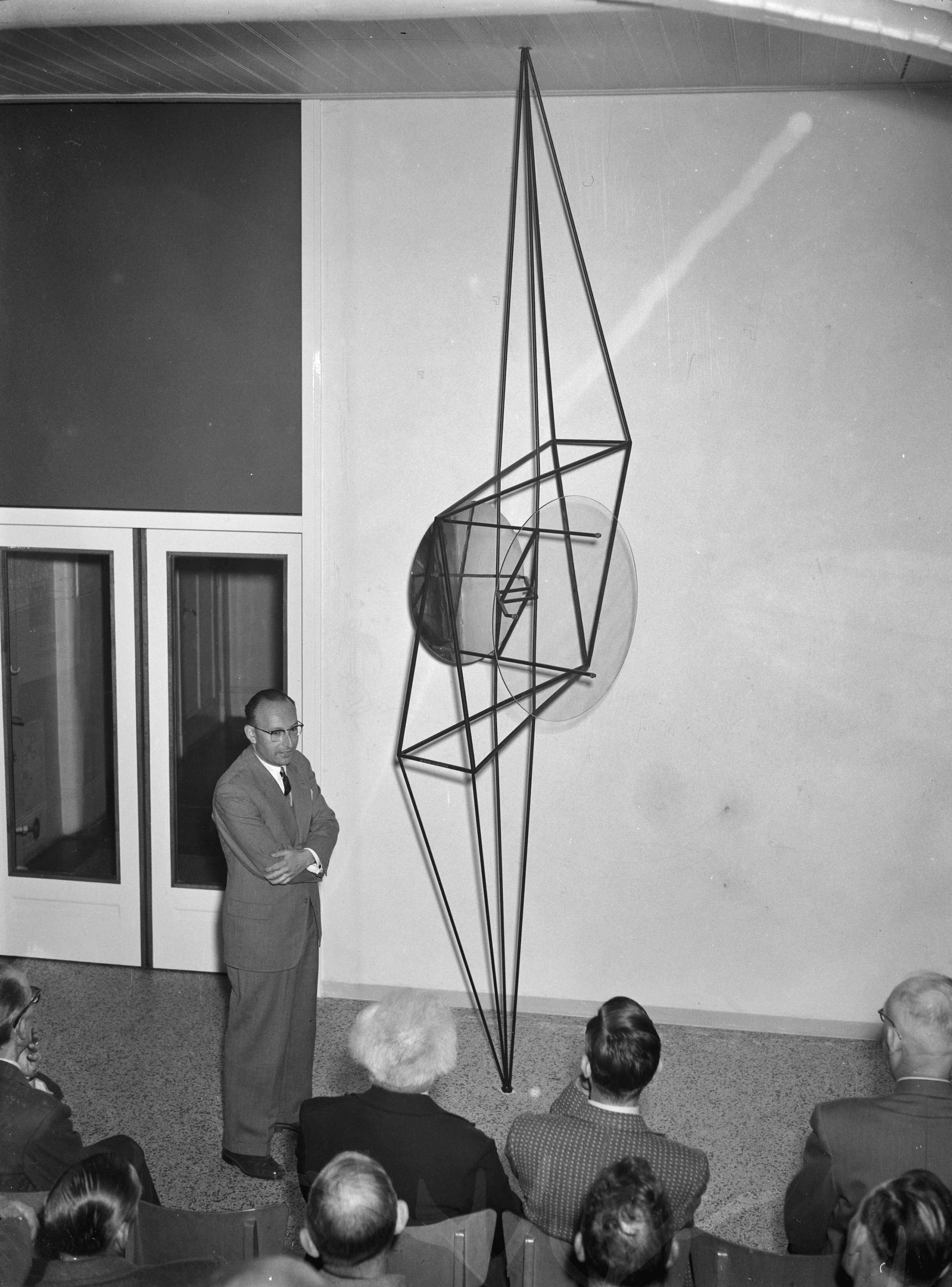 Collectie / Archief : Fotocollectie Anefo Reportage / Serie : [ onbekend ] Beschrijving : Wethouder Van der Berg neemt draadplastiek van Constant Nieuwenhuis in ontvangst Datum : 19 juni 1956 Trefwoorden : wethouders Fotograaf : Rossem, Wim van / Anefo Auteursrechthebbende : Nationaal Archief Materiaalsoort : Negatief (zwart/wit) Nummer archiefinventaris : bekijk toegang 2.24.01.04 Bestanddeelnummer : 907-8337 Reacties Geplaatst door Maaike op 22 september 2013 - 22:08. Constant Anton Nieuwenhuys (Amsterdam, 21 juli 1920 – Utrecht, 1 augustus 2005)